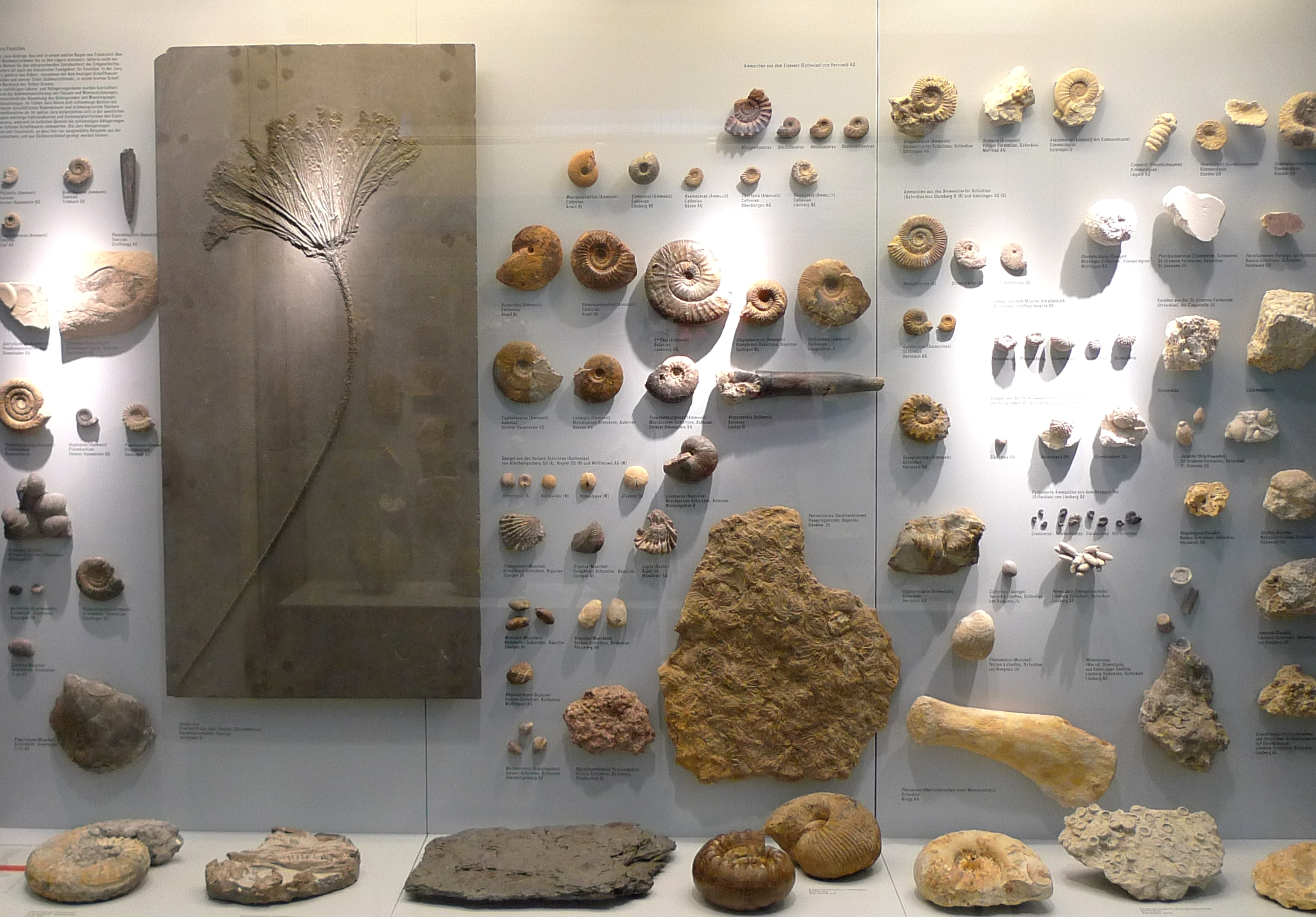 Zürich, Paläontologisches Museum der Universität Zürich, Karl-Schmid-Str. 4